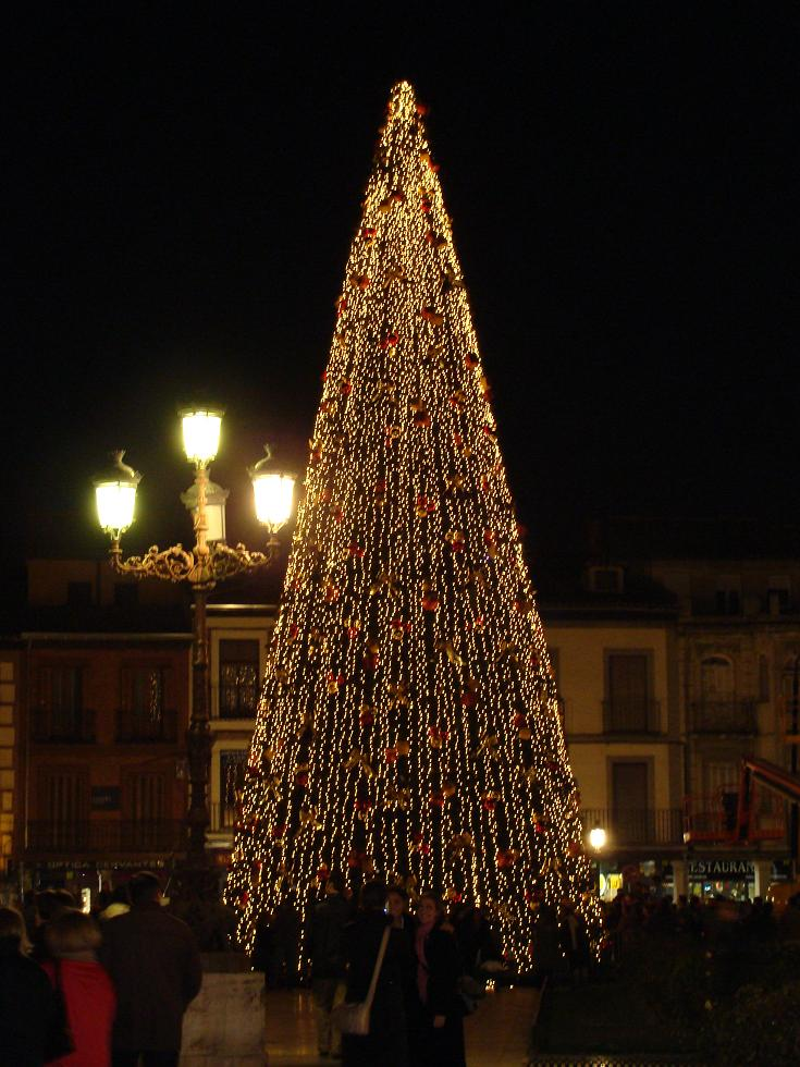 Árbol de Navidad en la Plaza de Cervantes de Alcalá de Henares, Comunidad de Madrid, España.